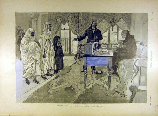 Caïd-gouverneur tunisien rendant la justice (milieu du XIXe siècle)